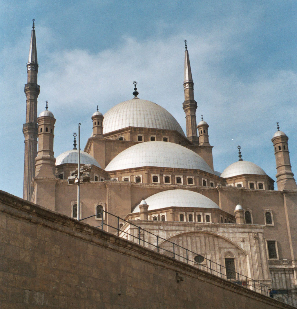 Mosquée de Mehemet Ali, dans la citadelle dominant le Caire (1830-1848) photo prise en février 2005 M. Benoist